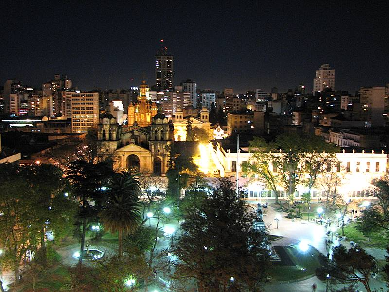 Plaza San Martín at night